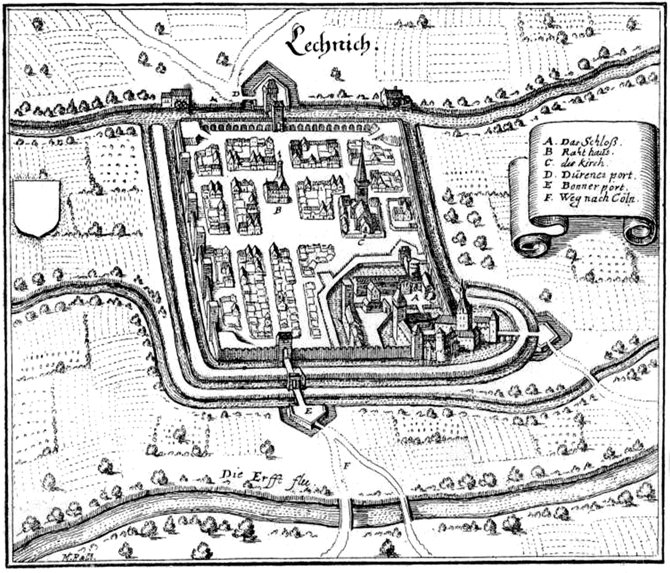 Lechenich (Stadtbefestigung Lechenich) nach einer Darstellung von Matthäus Merian d.Ä. 1646